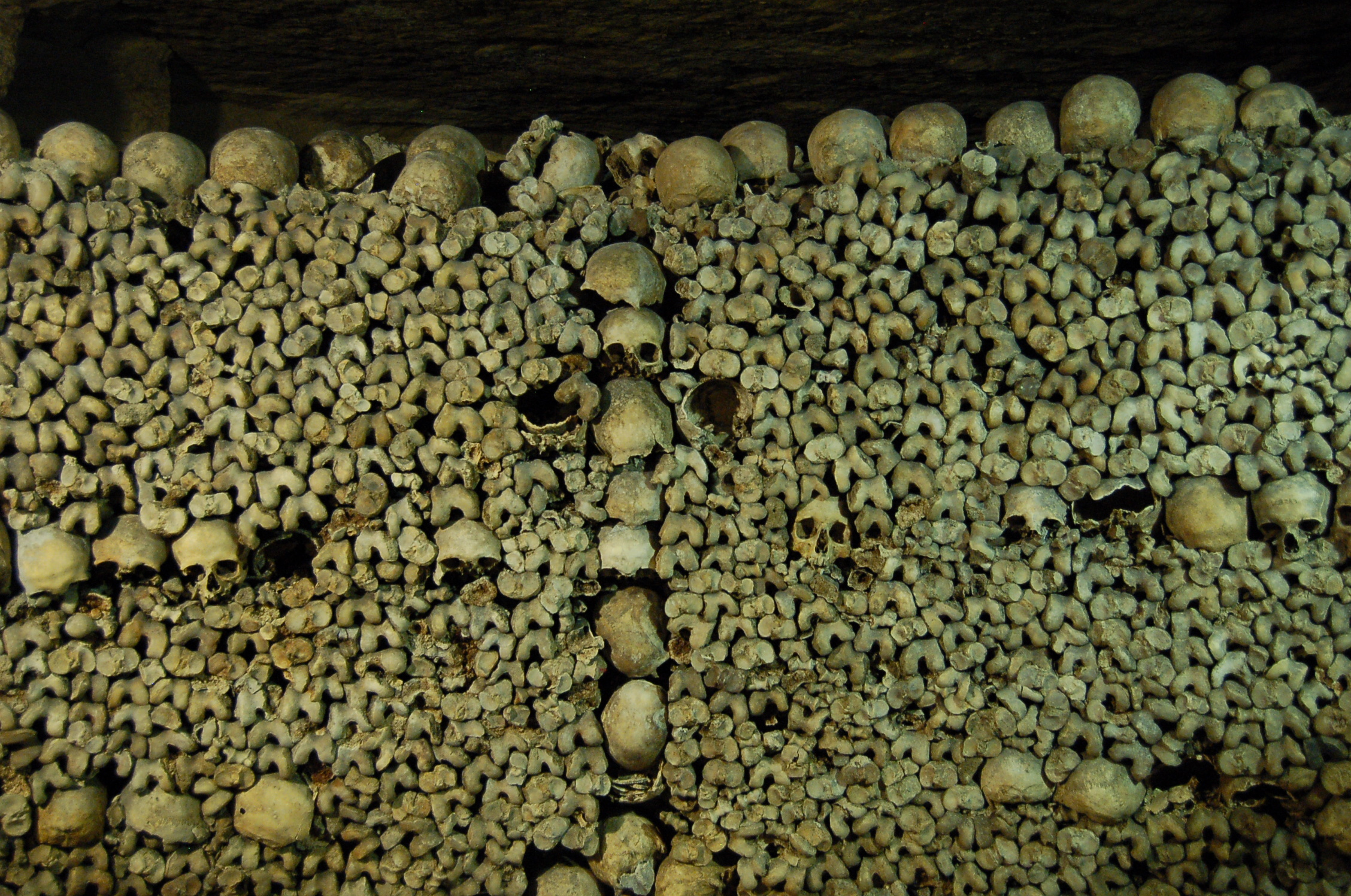 Empilement d'ossements dans les catacombes de Paris